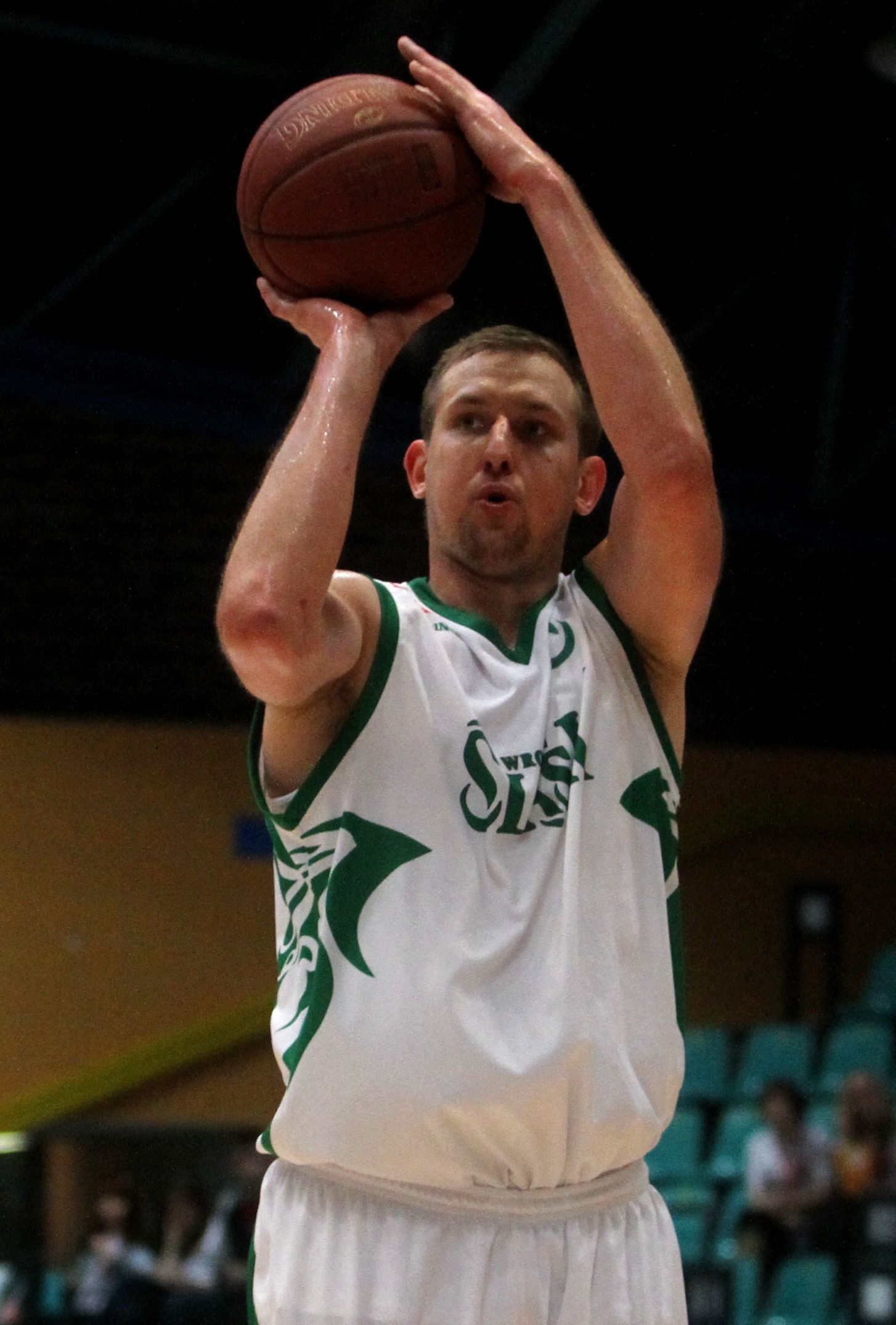 Michał Gabiński, Śląsk Wrocław